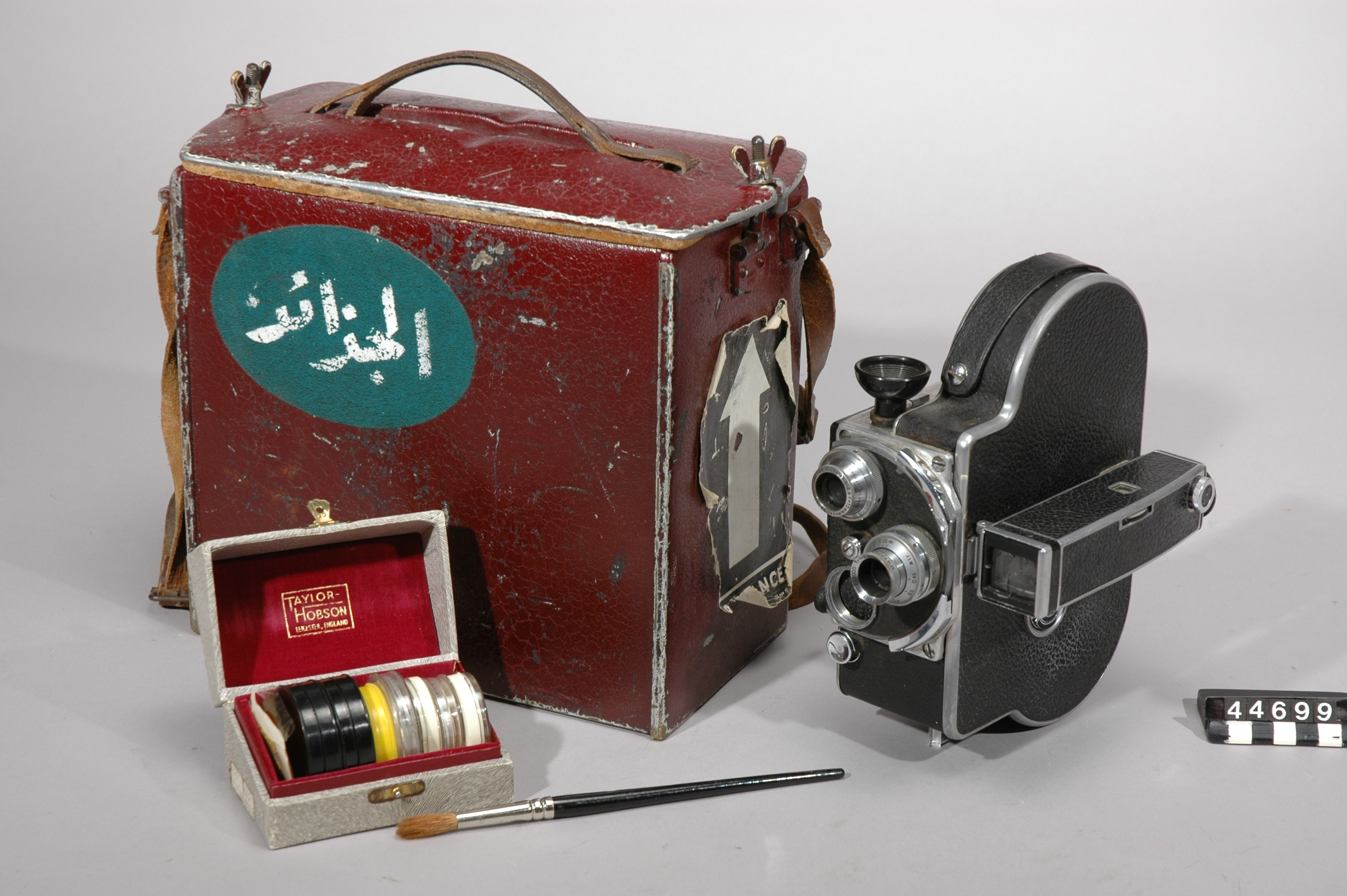 Denna kamera använde Gerd Almgren vid reportageresan till Guldkusten 1953